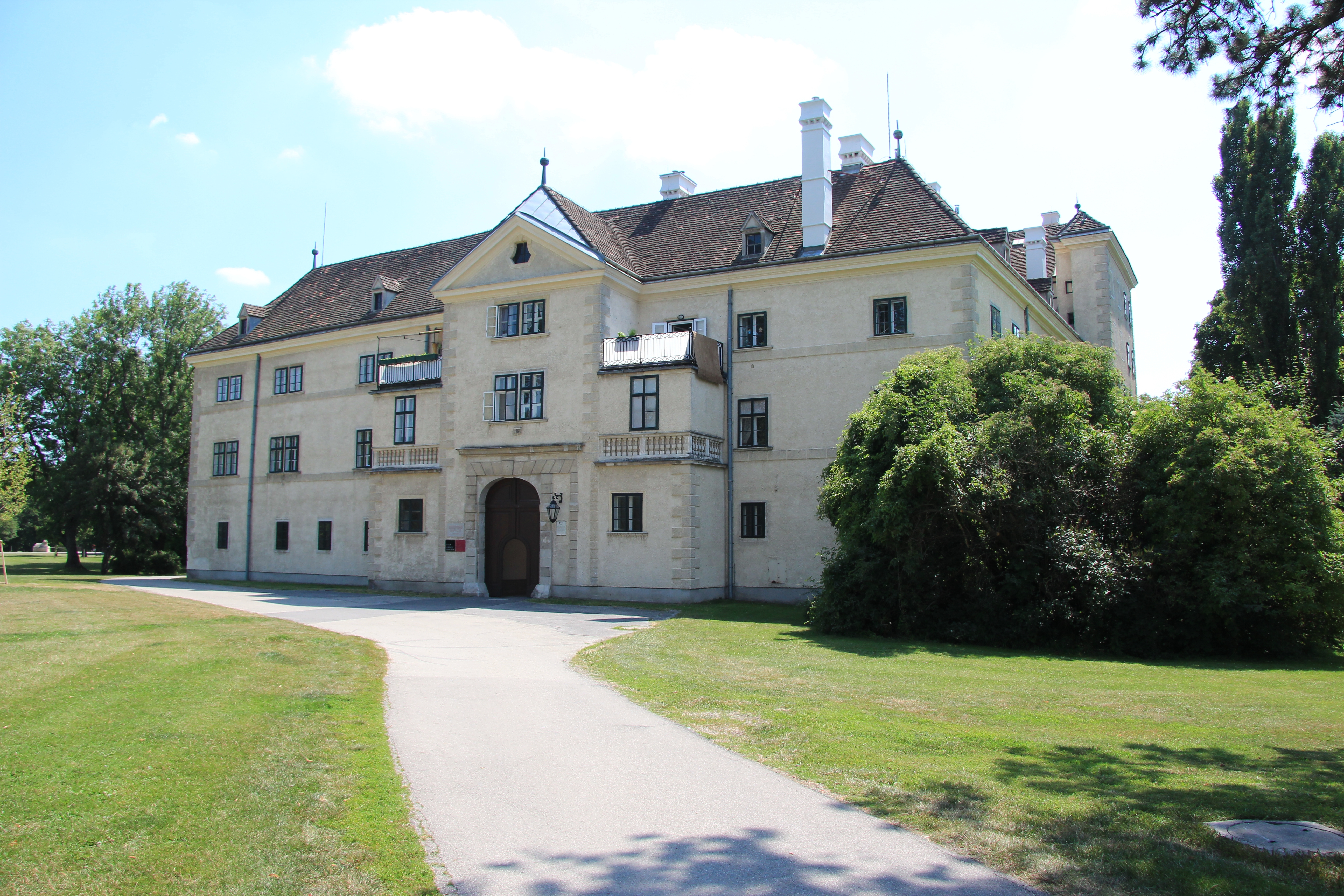 Schlosspark in Laxenburg, Niederösterreich